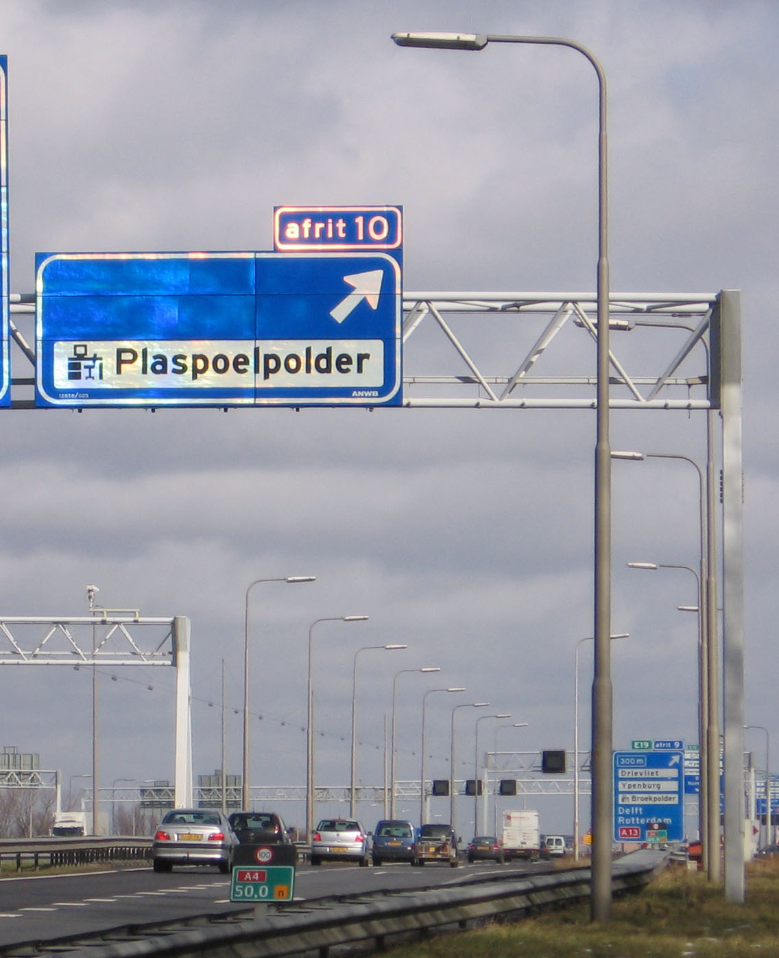 Afslag Plaspoelpolder gezien vanuit het Elsenburgerbos